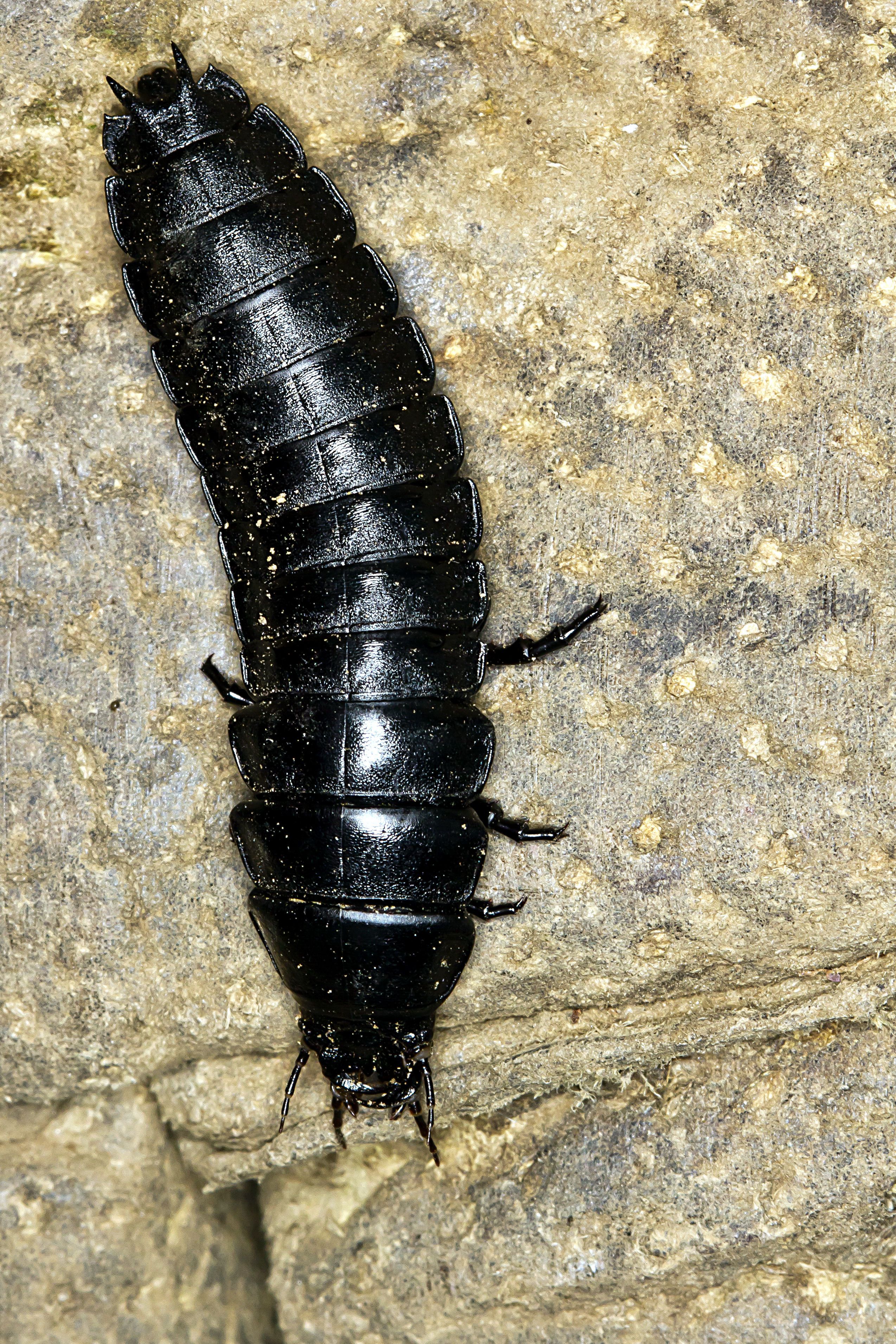 Sachsen, Steingarten: ausgegrabene Larve des Echten Laufkäfers